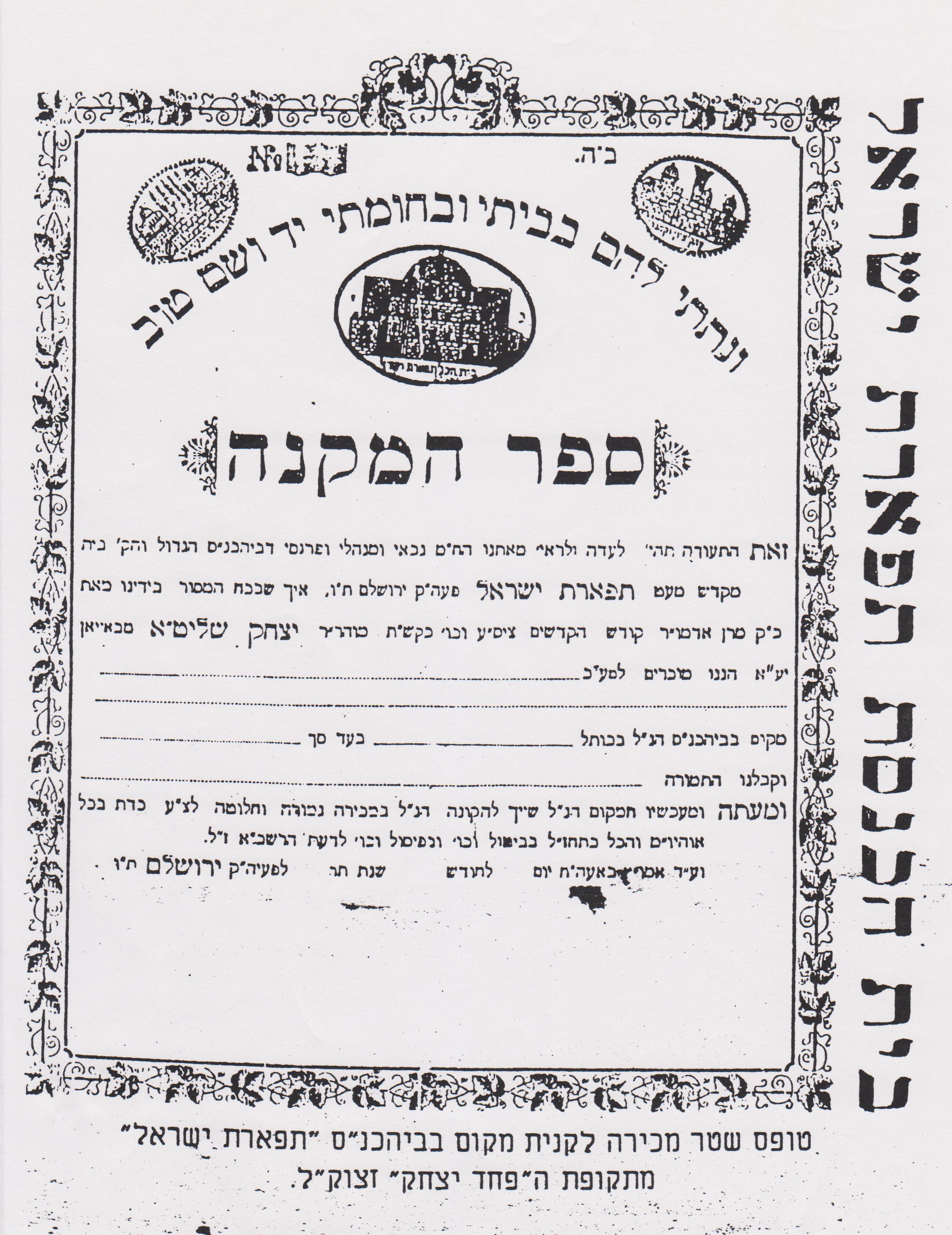 ספר מקנה מתקות נשיאותו של האדמו"ר רבי יצחק מבויאן